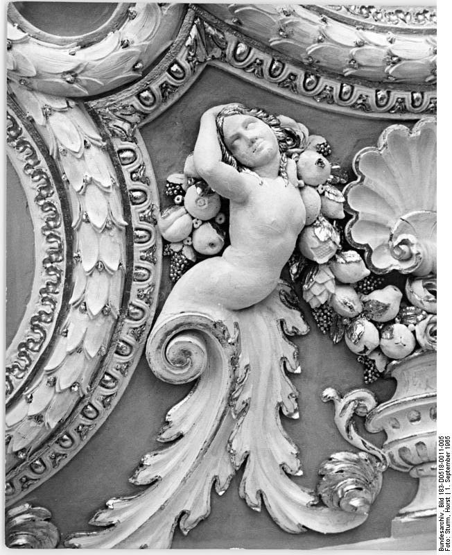 Berlin, Köpenicker Schloss, Detail, Putte Zentralbild Sturm September 1965 Das Köpenicker Schloss in BERLIN… (DDR) wurde 1677 bis 1682 von dem Holländer Rutger von Langerfeld im barocken Stil erbaut.Es wurde von der Regierung der Deutschen Demokratischen Republik nach denkmalpflegerischen Gesichtspunkten restauriert.Das Schloss vermag heute wieder einen kleinen Eindruck von der künstlerischen Schönheit der Architektur des 17.Jahrhunderts zu vermitteln.UBZ.Detail einer Stuckdecke in einem Saal des Köpenicker Schlosses.